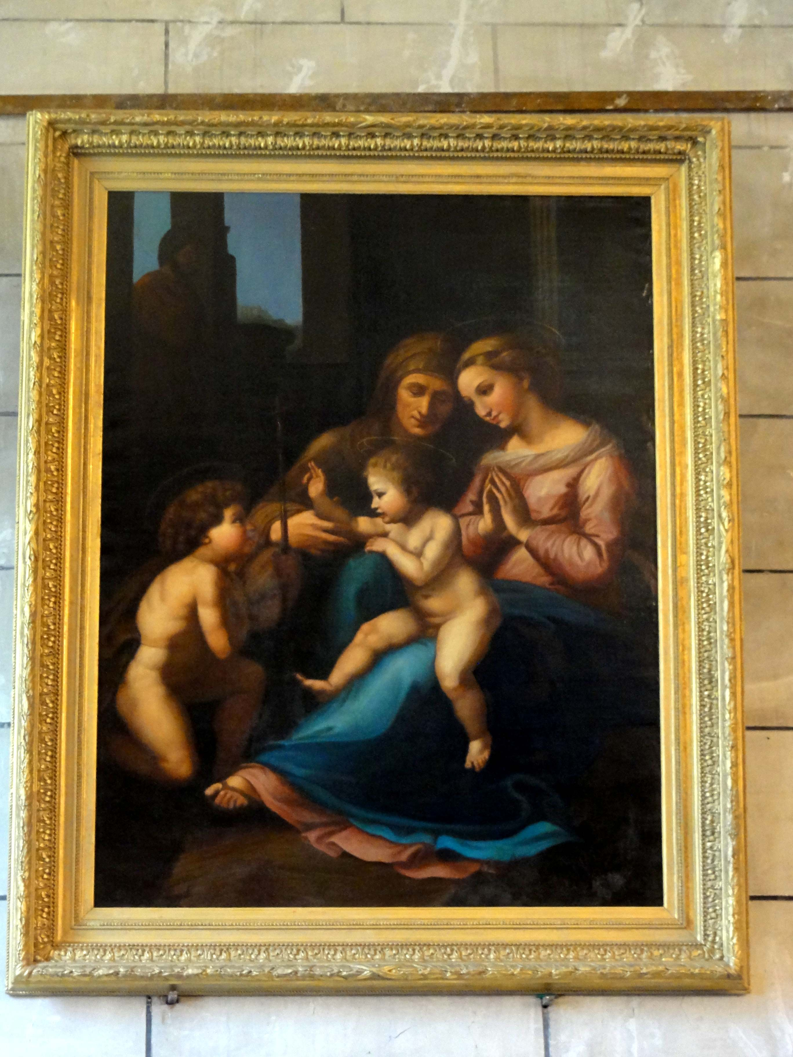 Mobilier de l'église (voir titre).